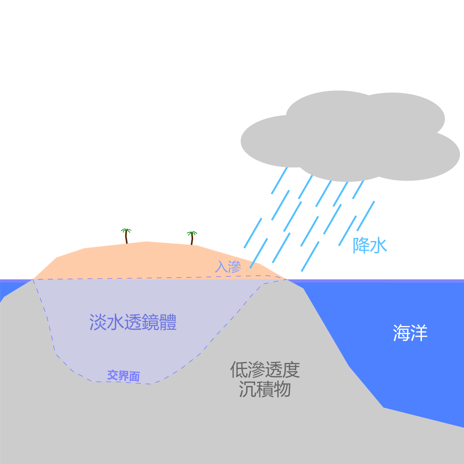 根據蓋本-赫茲方程式（Ghyben-Herzberg eq.）推導，理想中地下水（淡水）在島嶼地下形成的透鏡體構造。